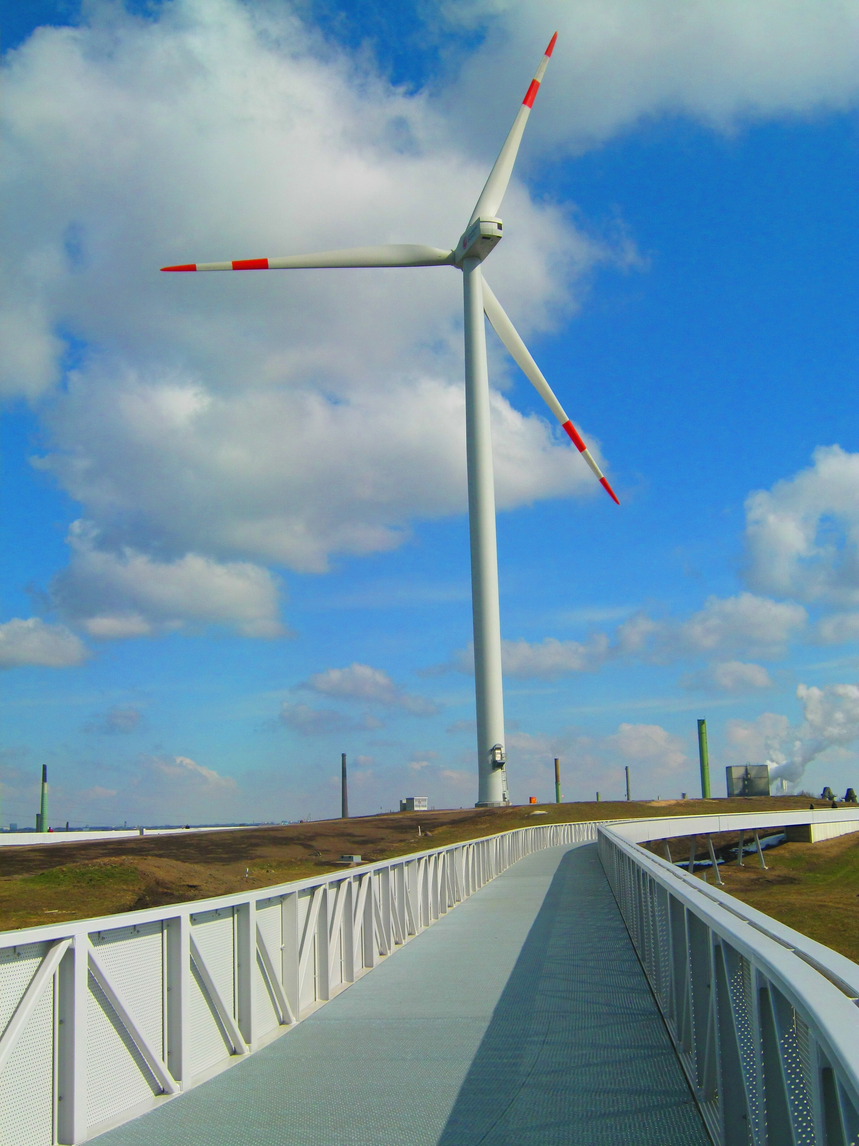 Auf dem Plateau des Energiebergs IBA (ehemalige Mülldeponie Georgswerder in Hamburg-Wilhelmsburg) befinden sich der Horizontweg und mehrere Windgeneratoren.